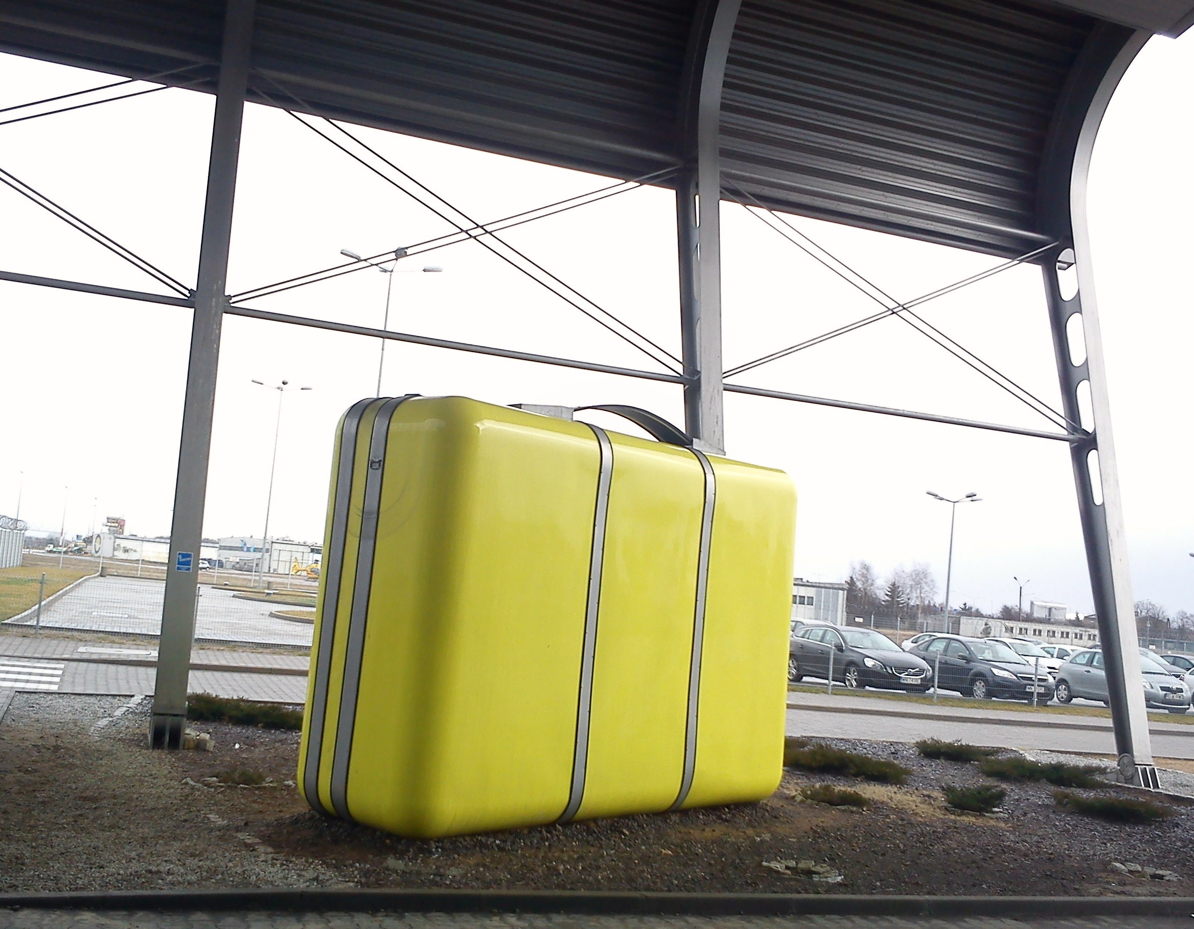 "Neseser" Macieja Kuraka - Poznań, lotnisko Ławica. Unknown